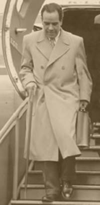 دکتر حسین فاطمی در دوران وزارت امور خارجه ایران